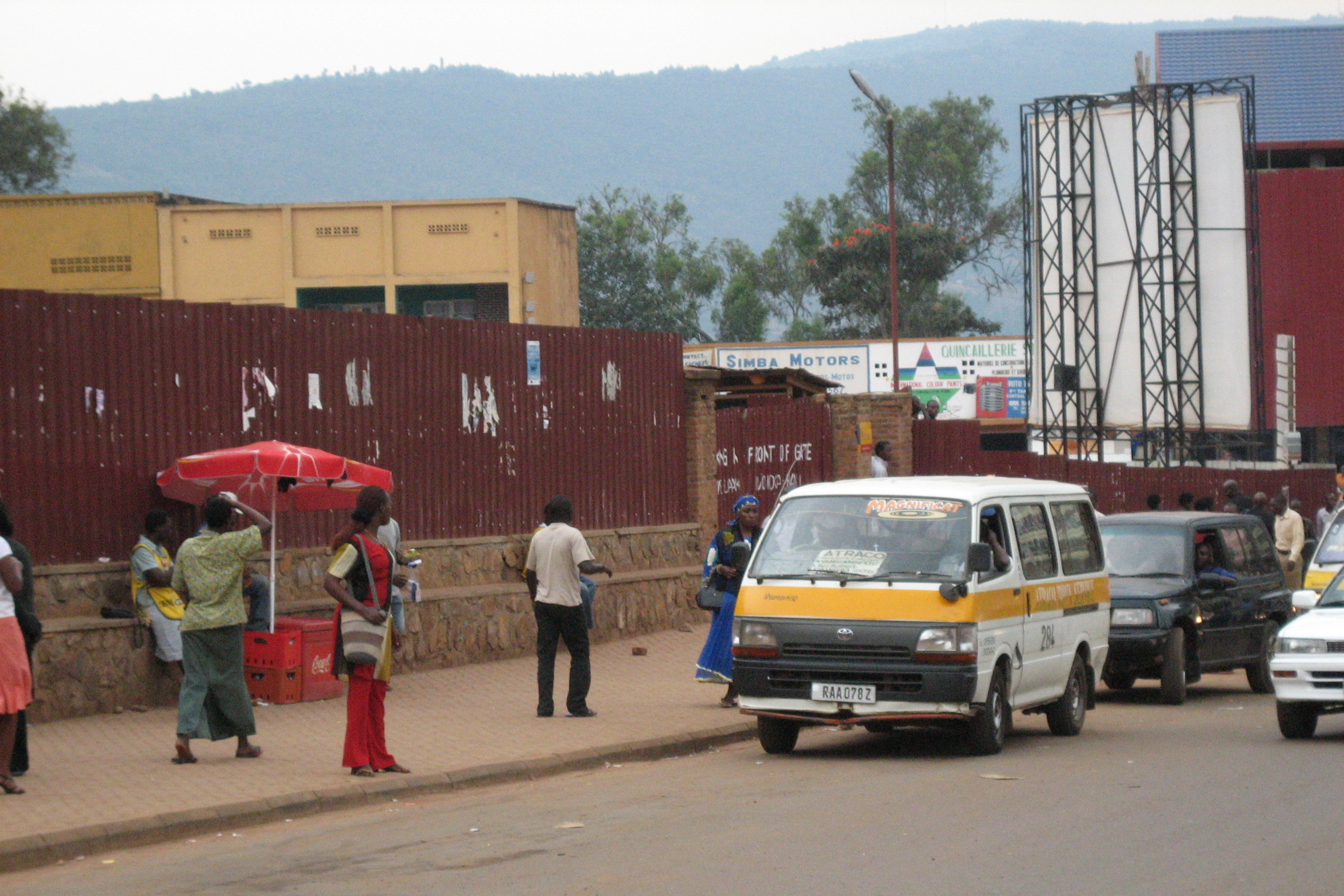 Minibus in Kigali, Rwanda